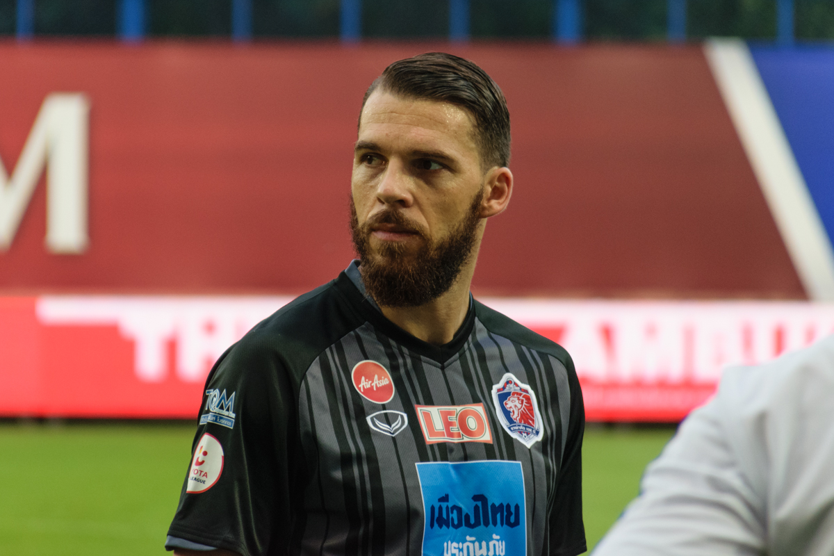 Dragan Boskovic